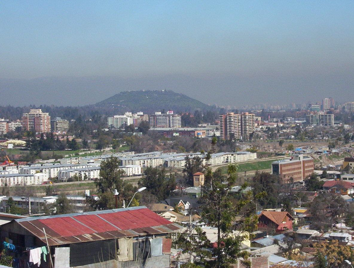 Lo Barnechea